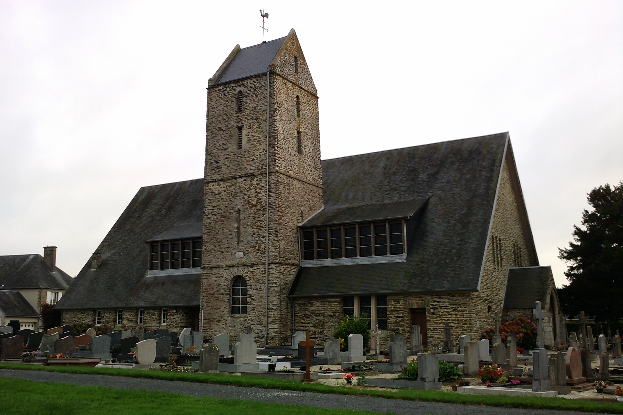 Église Saint-Pierre de la La Chapelle-en-Juger Le porche et une partie de la tour à bâtière ont été épargnés par les bombardements de 1944